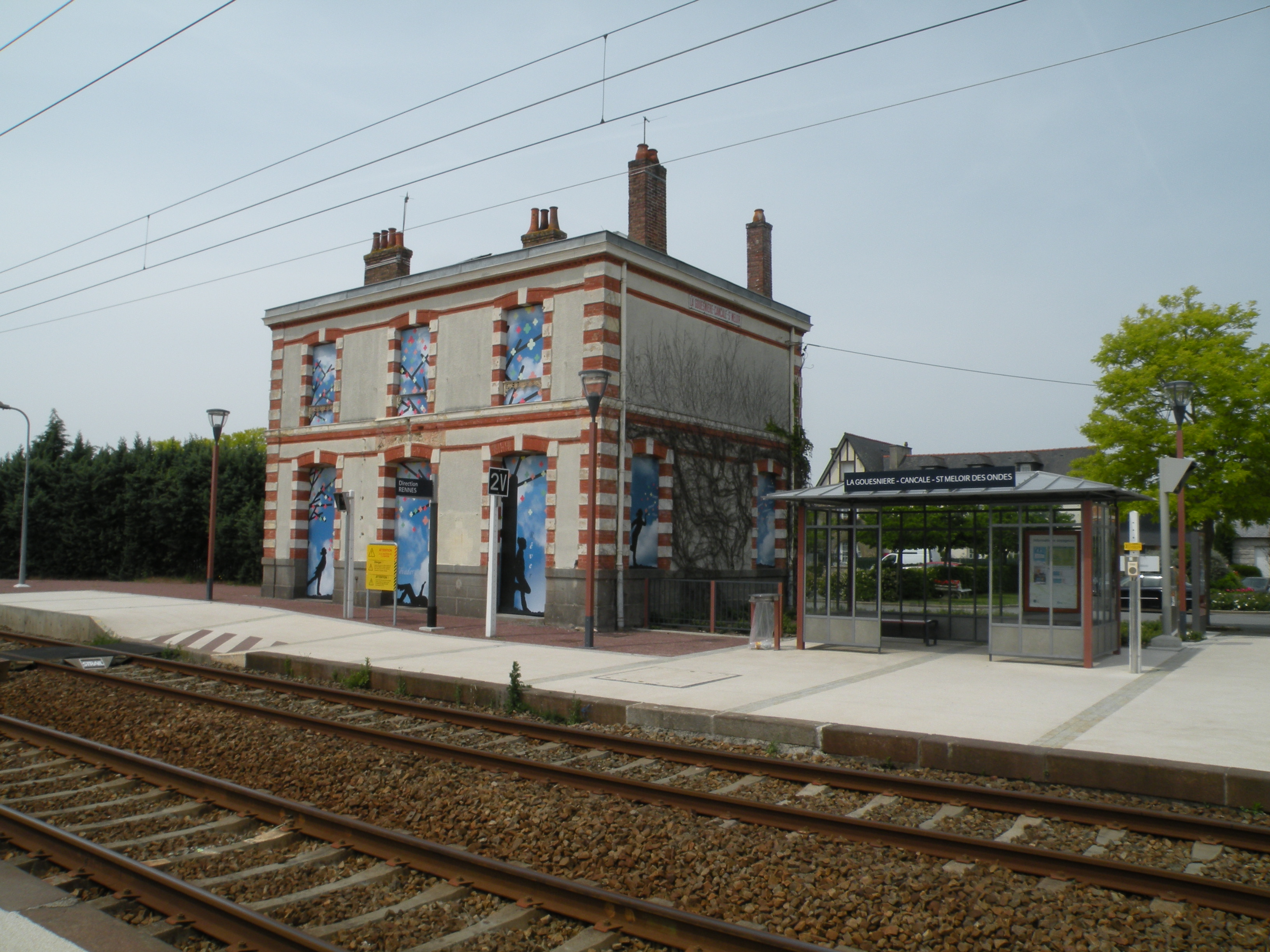 La gare de La Gouesnière - Cancale - Saint-Méloir-des-Ondes.